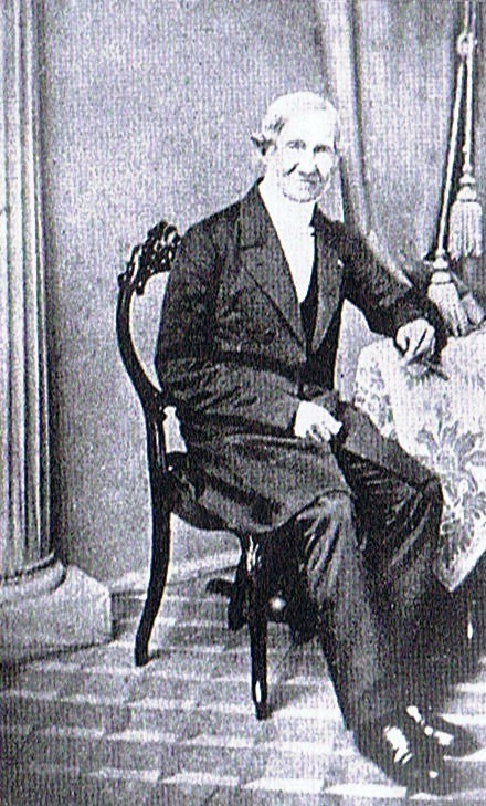 August Milarch (1786–1862), Foto von 1859